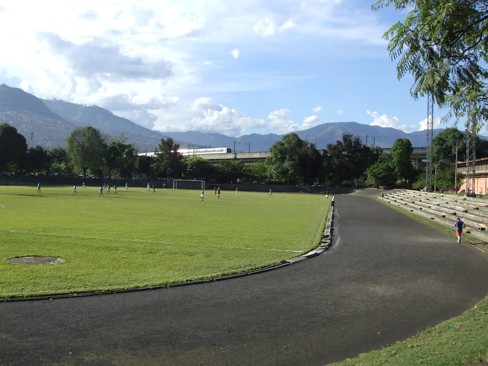 Estadio de la Universidad de Antioquia. Mirando hacia el norte. Medellín, Colombia